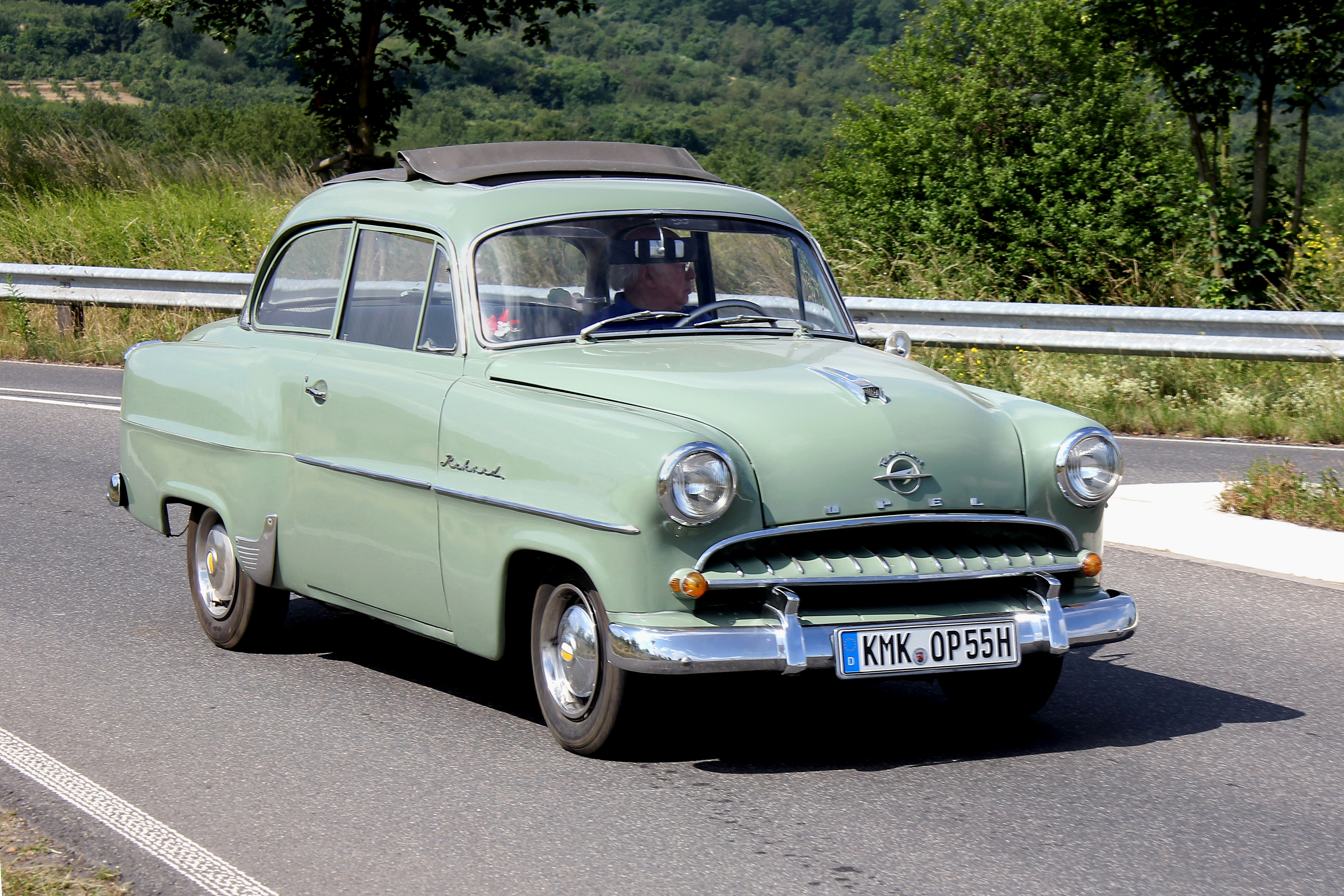 Opel Olympia Rekord, Baujahr 1955; Kennzeichen verändert